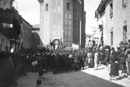 Procesión católica en la Plaza de la Constitución.